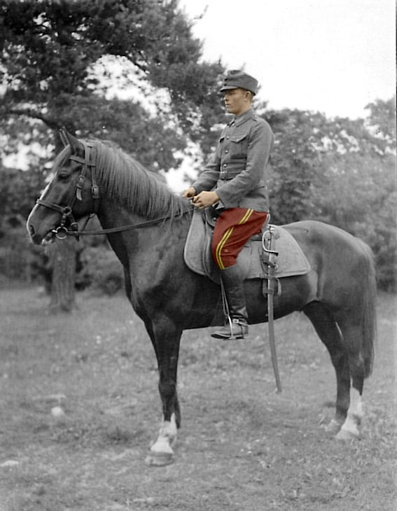 Ratsuväen aliupseerioppilas.